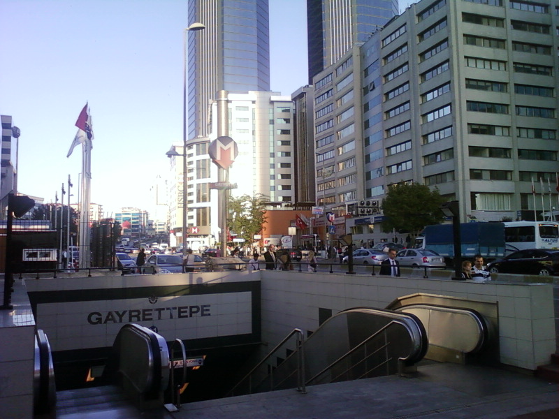 İstanbul metrosu Esentepe Girişi